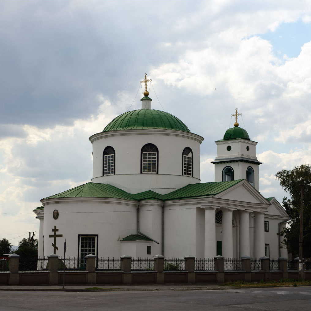 Троїцька церква (мур.), Котельва